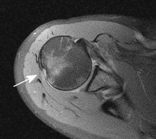 MRT der Schulter. Im hinteren seitlichen Abschnitt des Oberarmkopfes kommt eine sogenannte Hill-Sachs-Delle zur Darstellung. Diese Delle ist typisch für einen Zustand nach Schulterluxation.